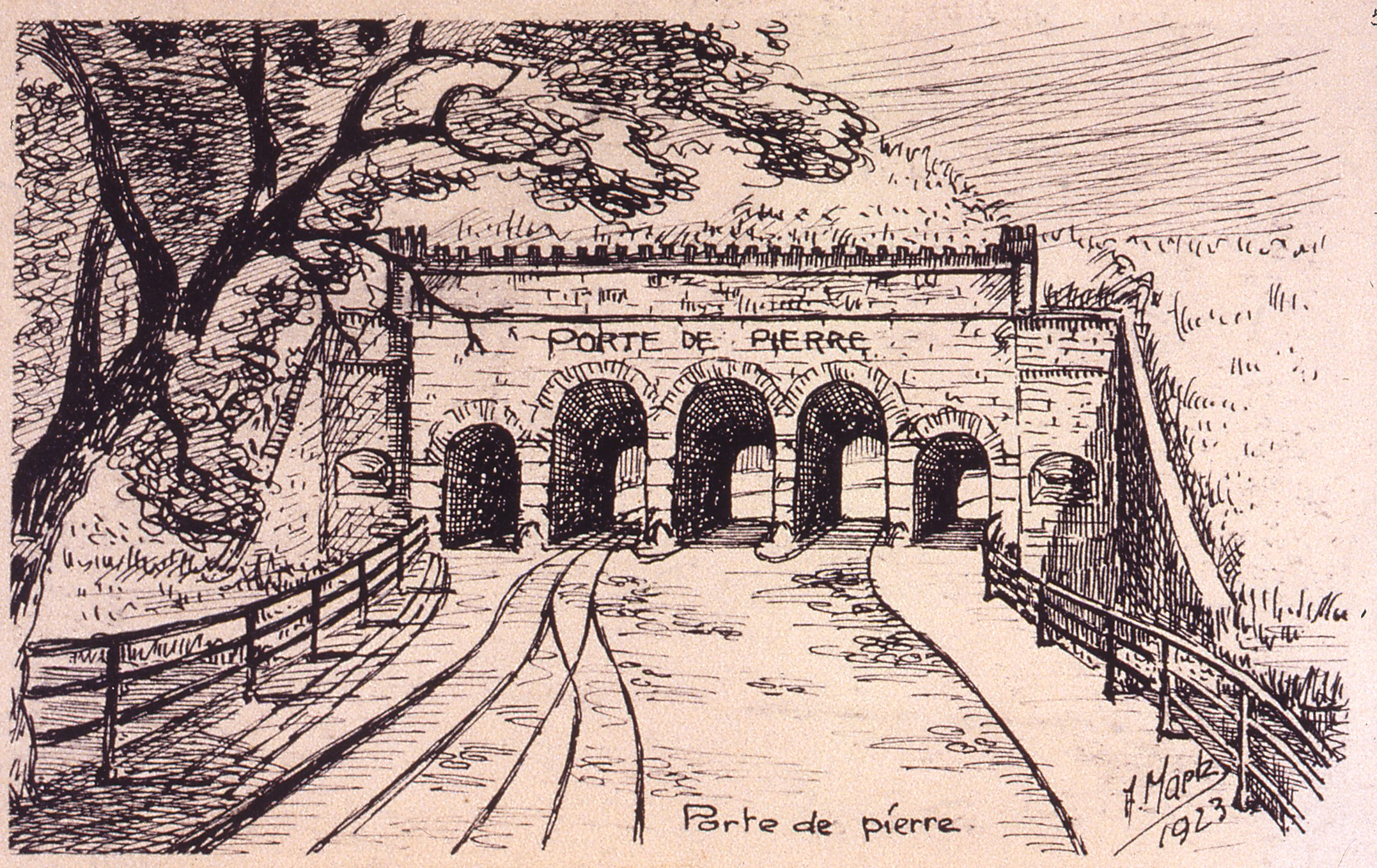 Dessin de la porte de Pierre (Steintor) de Strasbourg